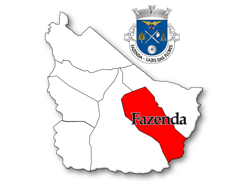 População